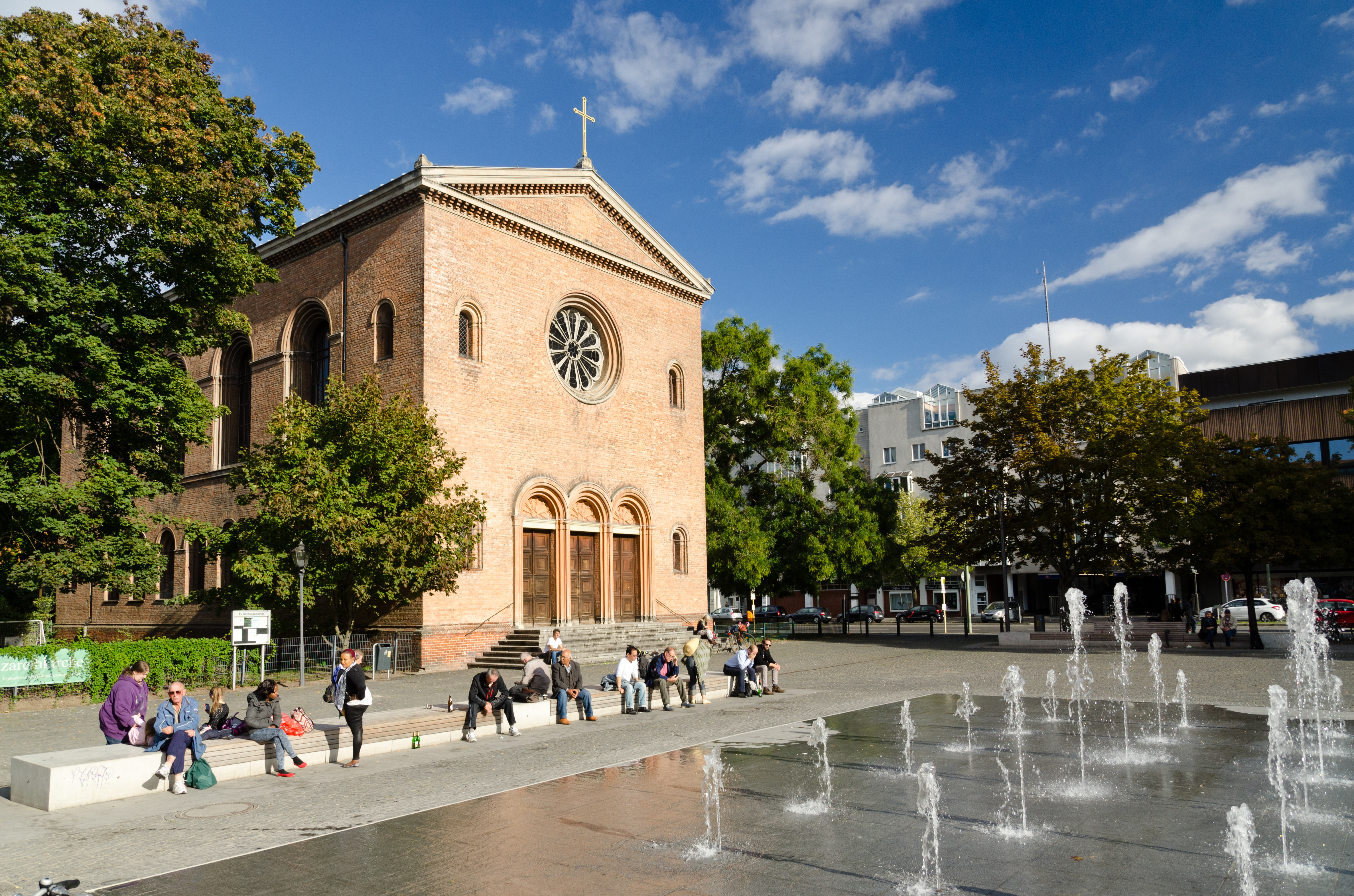 Leopoldplatz, Ev. Alte Nazarethkirche, 1832–35 von Karl Friedrich Schinkel, Kirche und Leopoldplatz im Vordergrund